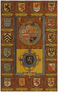 A Tizenhét Tartomány néven ismert németalföldi államalakulat címerei. Ludowico Guicciardini munkája.